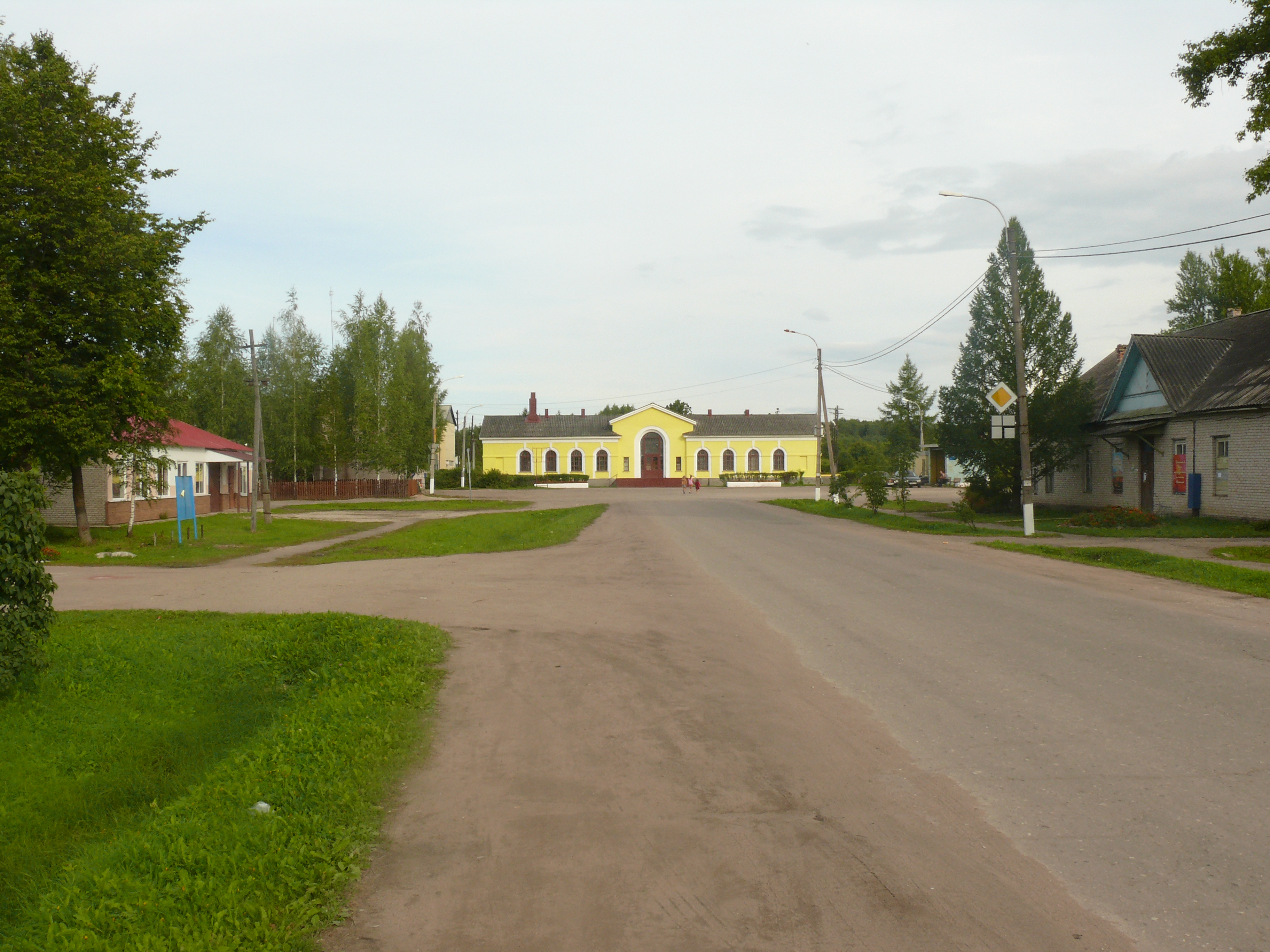 Посёлок Батецкий. Новгородская область